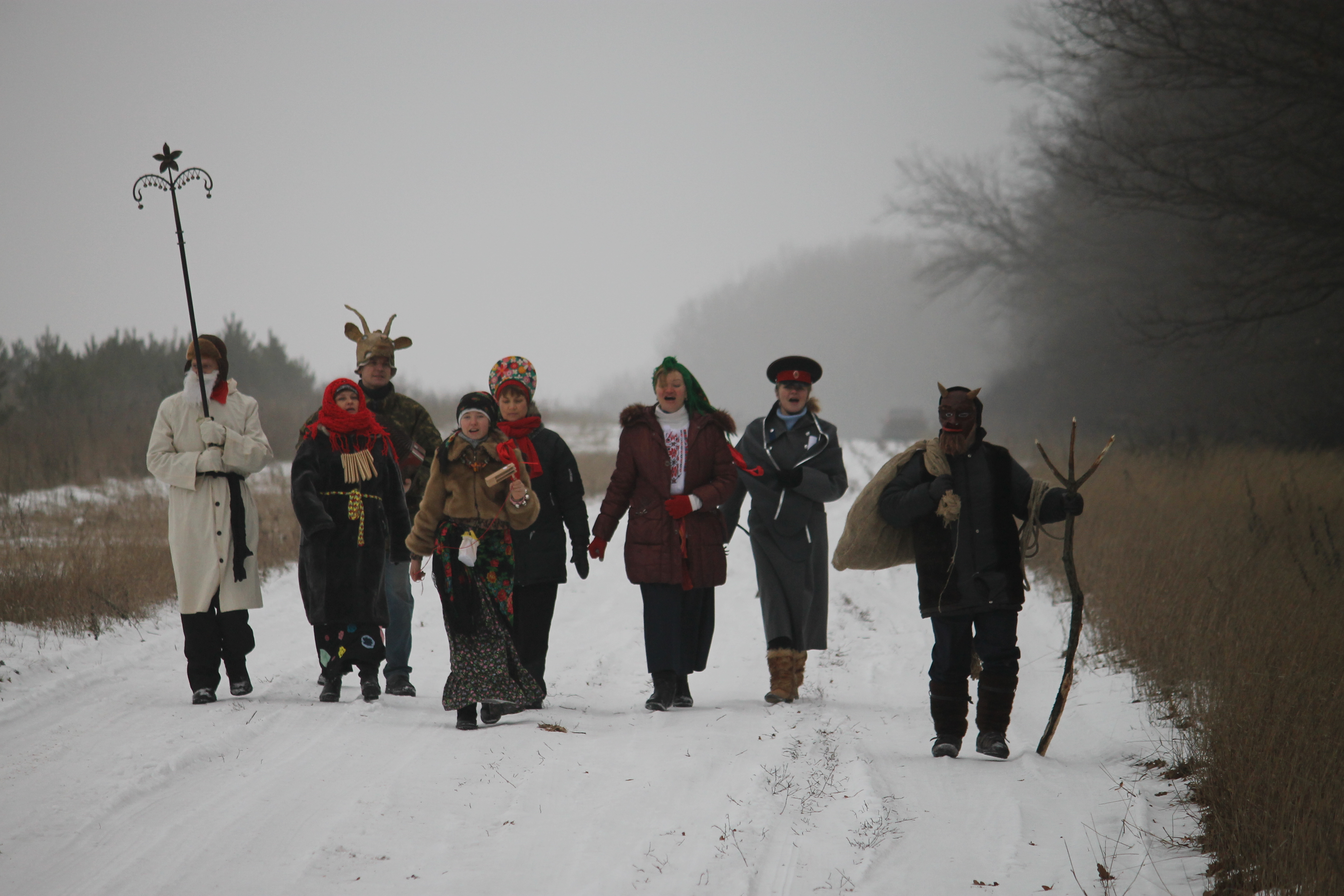 Колядки в родовом экопоселениии «Кореньские родники». Белгородская область, Россия, декабрь 2013 г.